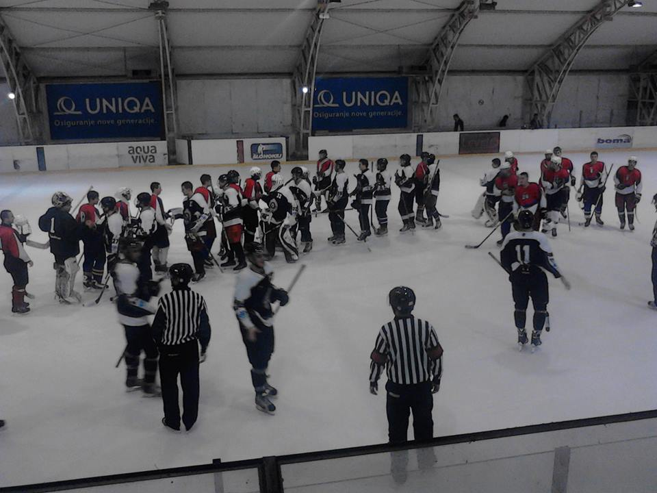 Srpski (latinica): Prvo kolo Hokejaške lige Srbije između Srbije U20 i Partizana